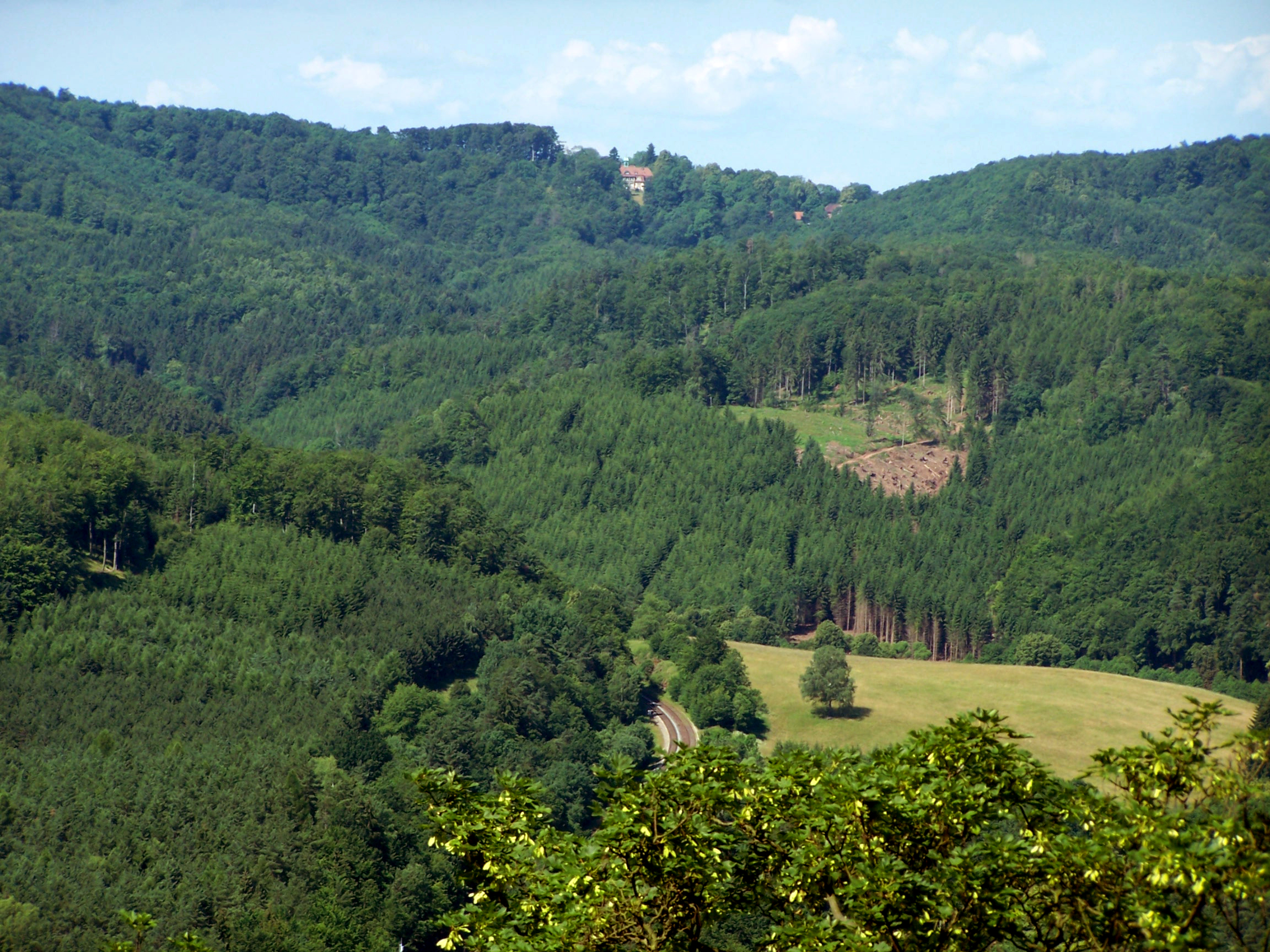 Thüringer Wald bei Eisenach, der Aufstieg zum Clausberg, Blick von der Wartburg